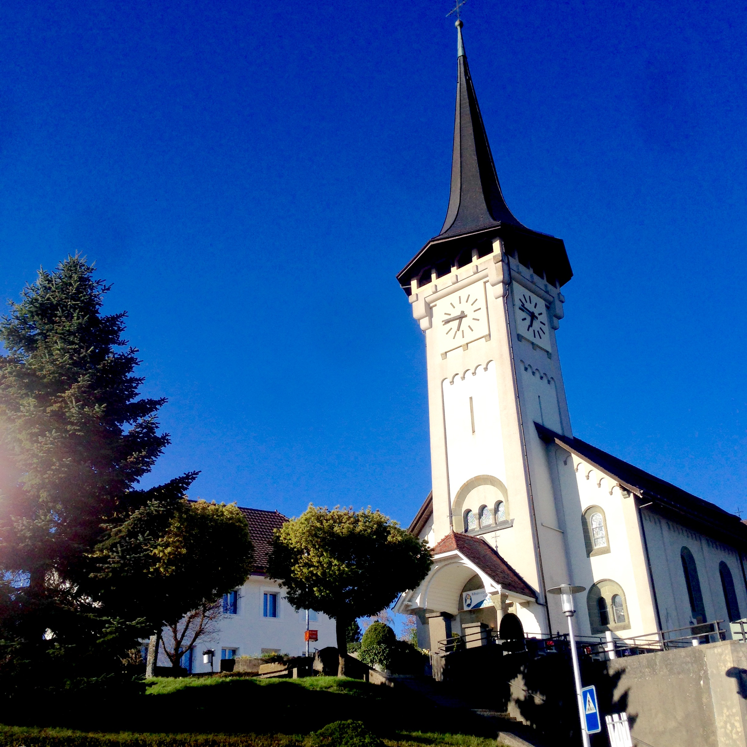 Église de Villars-sur-Glâne en avril 2016.